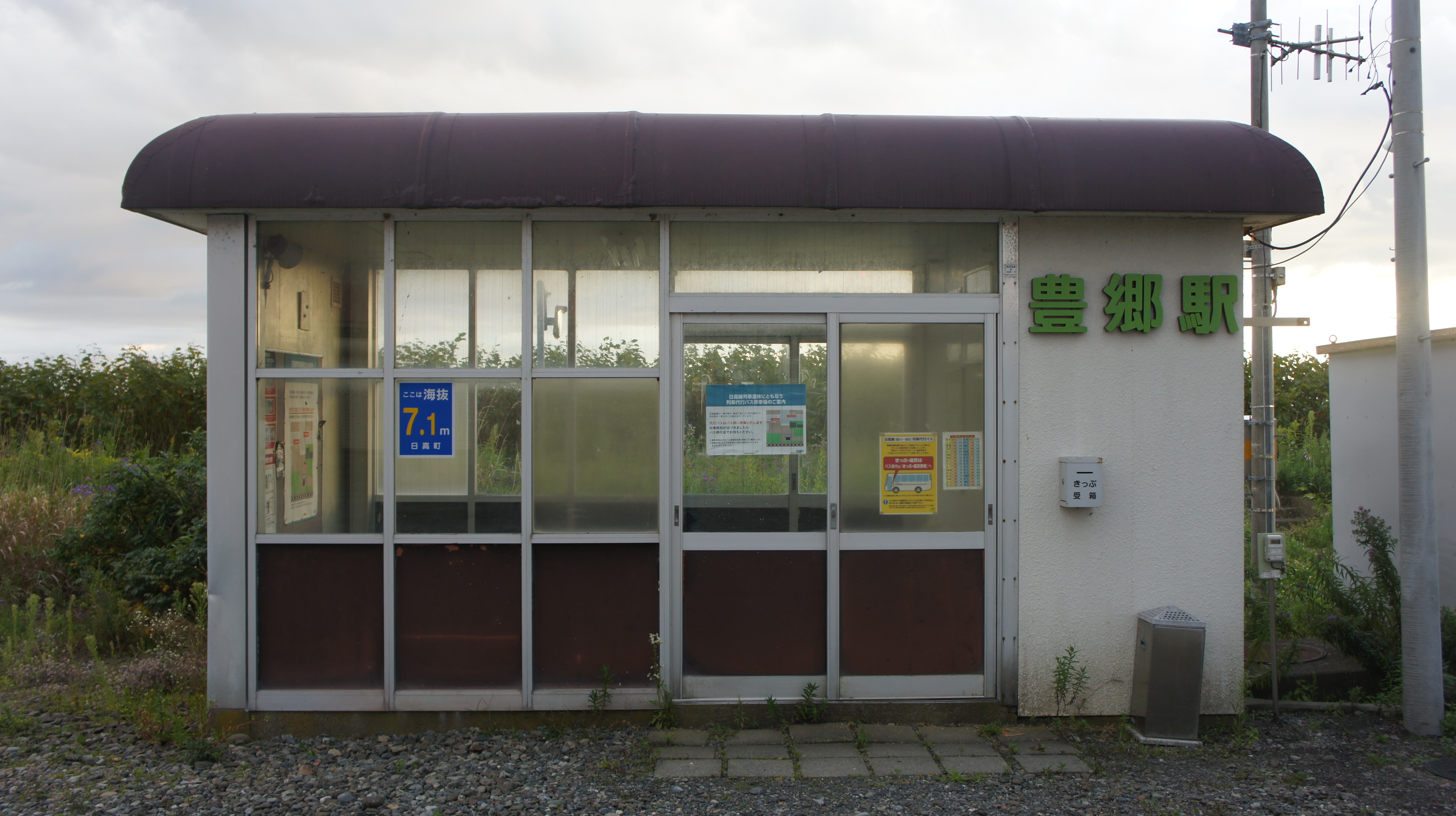 JR日高本線・豊郷駅の駅舎